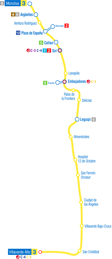 Recorrido de la línea 3 del Metro de Madrid